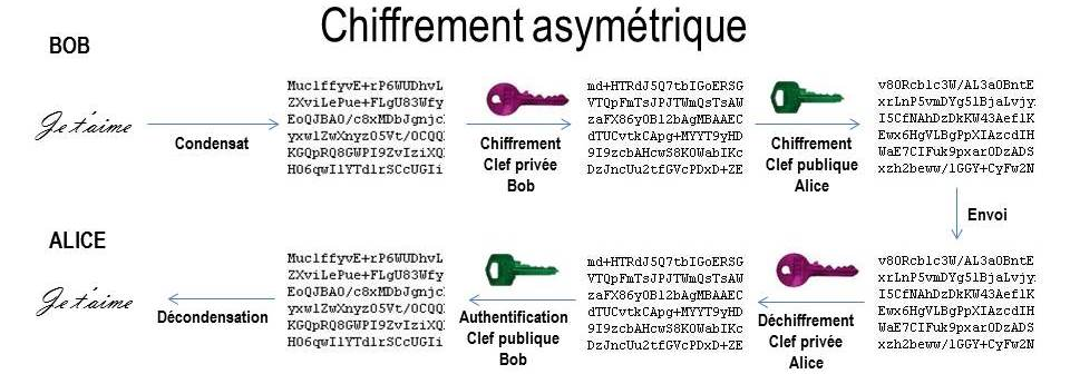 Méthode de chiffrement et de déchiffrement asymétrique